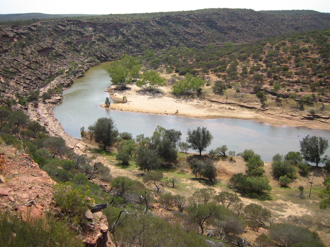 La Murchison Riveren Australie occidentale